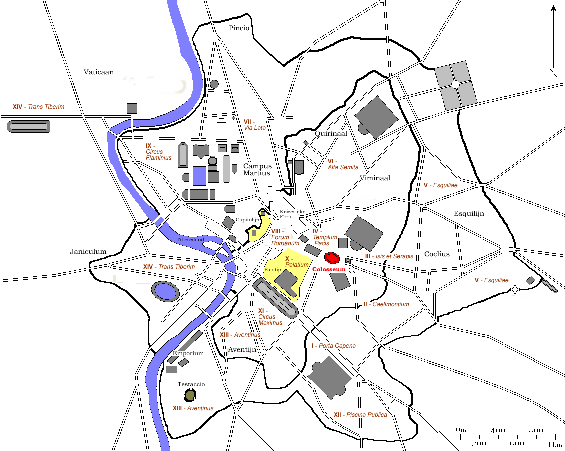 Kaart van antiek Rome waarop het Colosseum is uitgelicht. Kaart is afkomstig van FR:wiki en door mij naar een Nederlandse versie bewerkt. Auteurs: nl::fr:User:ColdEel en Gebruiker:Joris1919